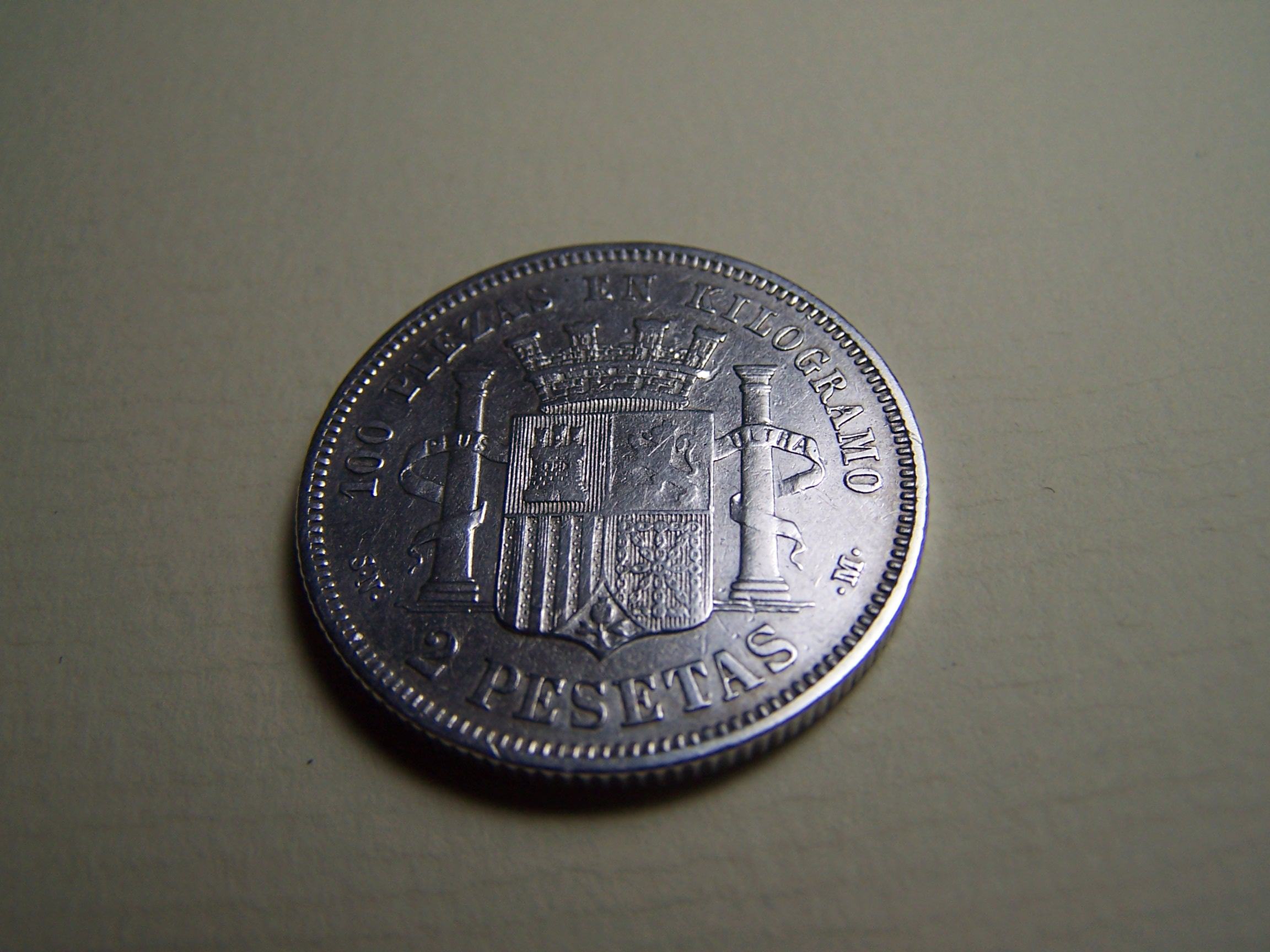 Moneda 2 pesetas 1869 - reverso